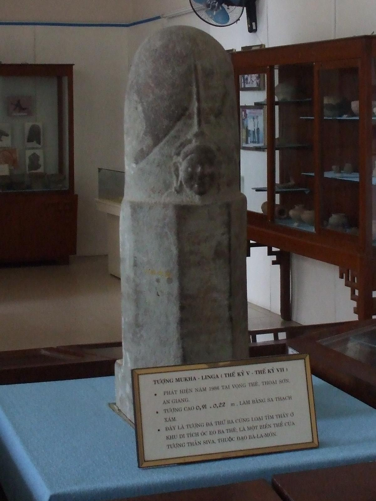 Linga, cổ vật được khai quật tại Ba Thê, thị trấn Óc Eo, huyện Thoại Sơn, tỉnh An Giang (Bảo tàng An Giang, Long Xuyên).